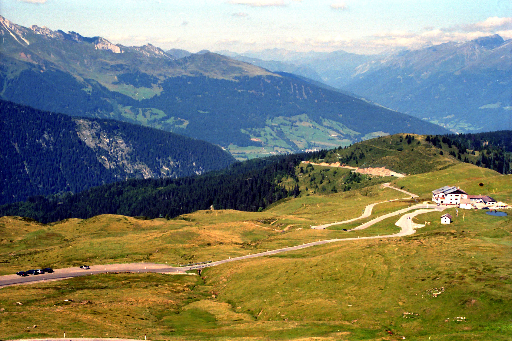 Blick vom Jaufenpass Richtung Nordost (Sterzing)